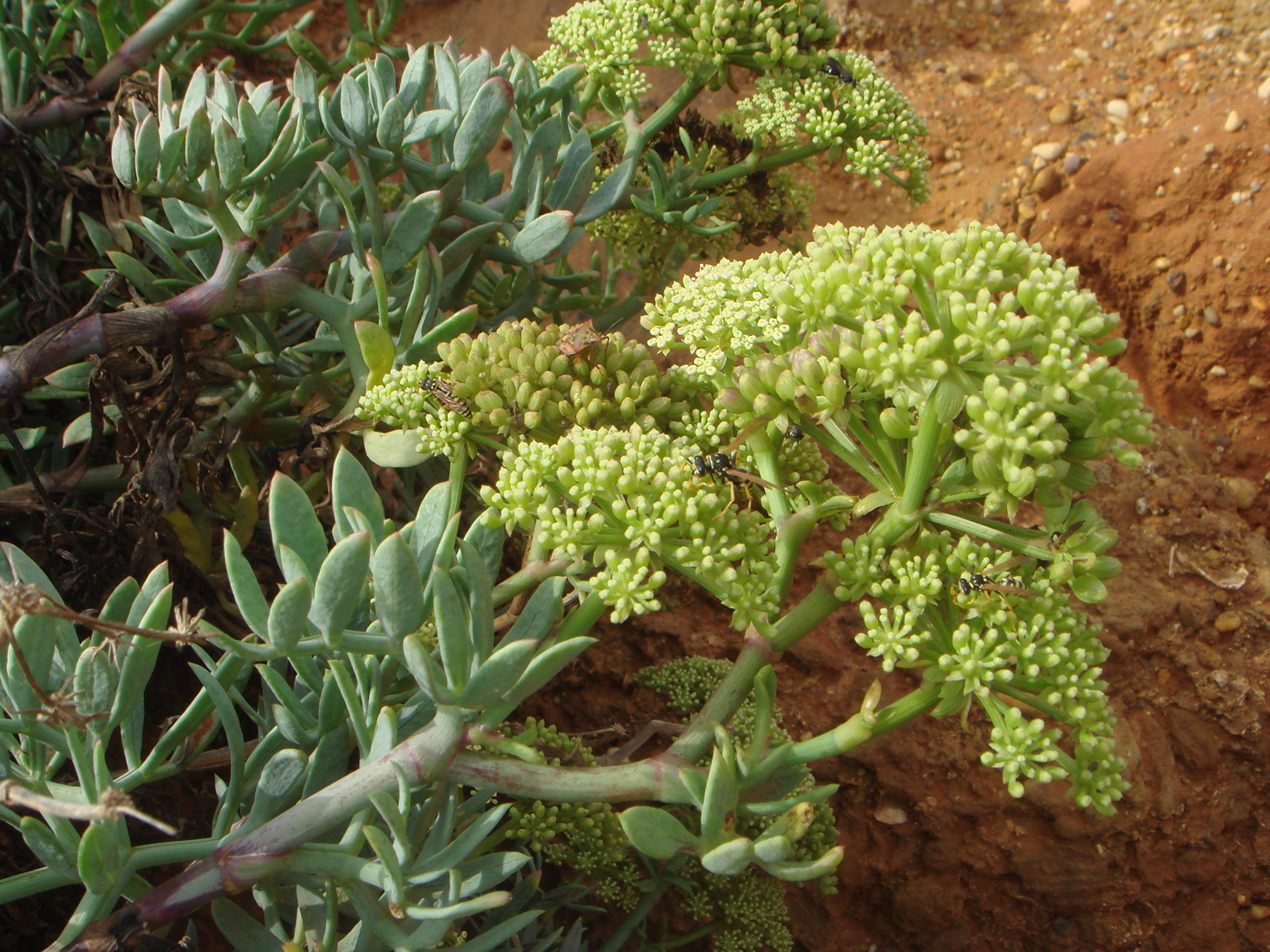 Crithmum maritimum, Hinojo marino, Chiclana (Cádiz), España